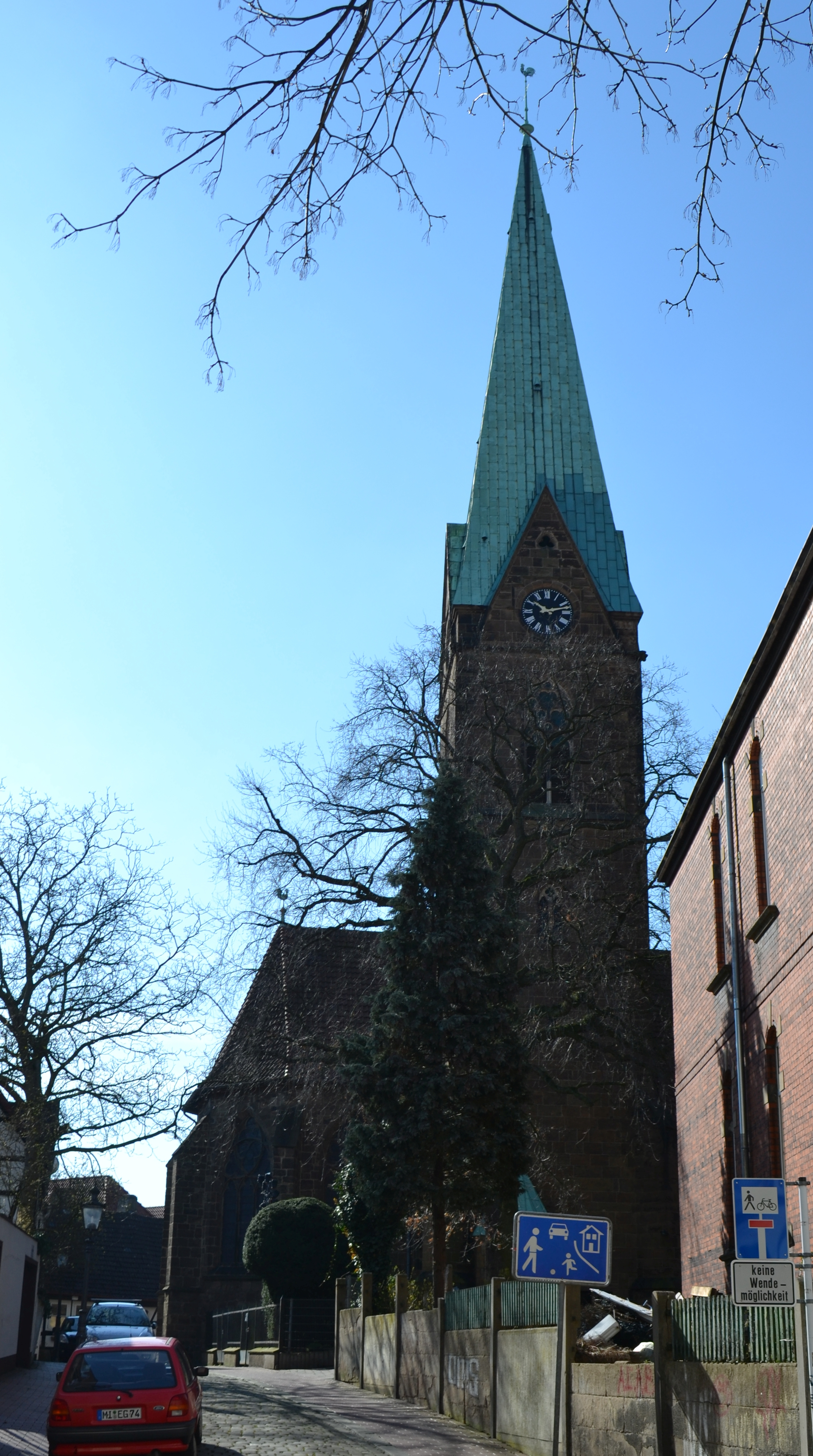 St Simoens Kirche Minden, von Norden aus gesehen.